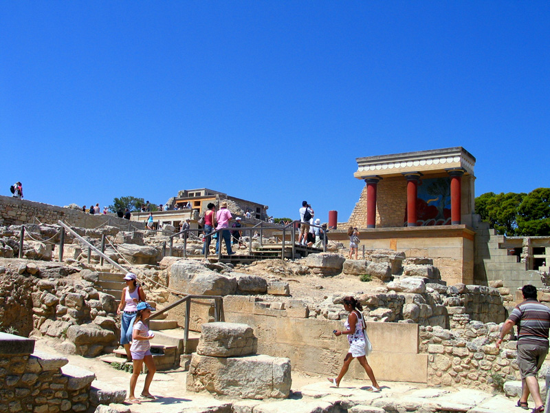 2008 Knosos